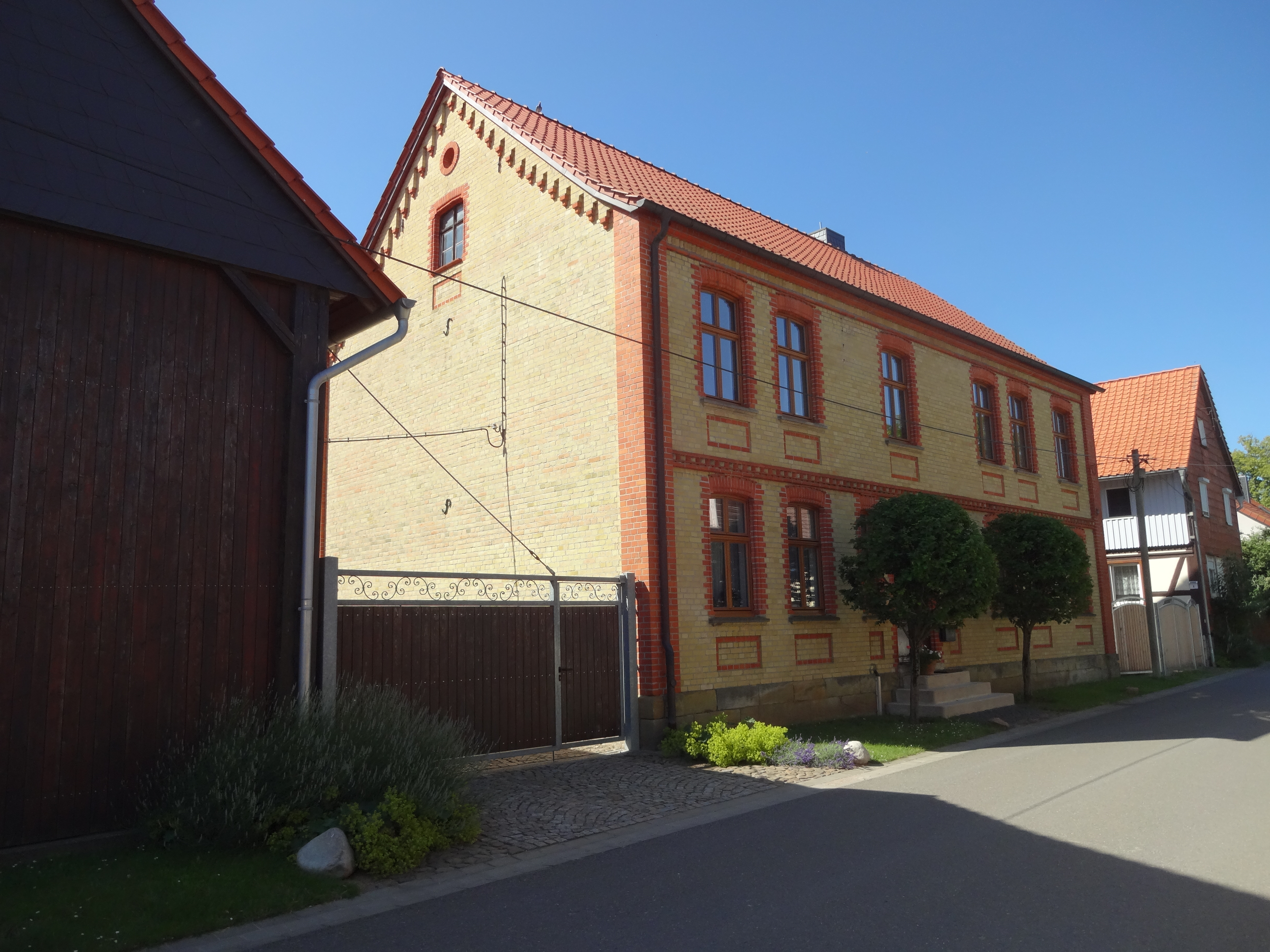 denkmalgeschützter Bauernhof in der Straße Neustadt 10 in Langeln, Gemeinde Nordharz